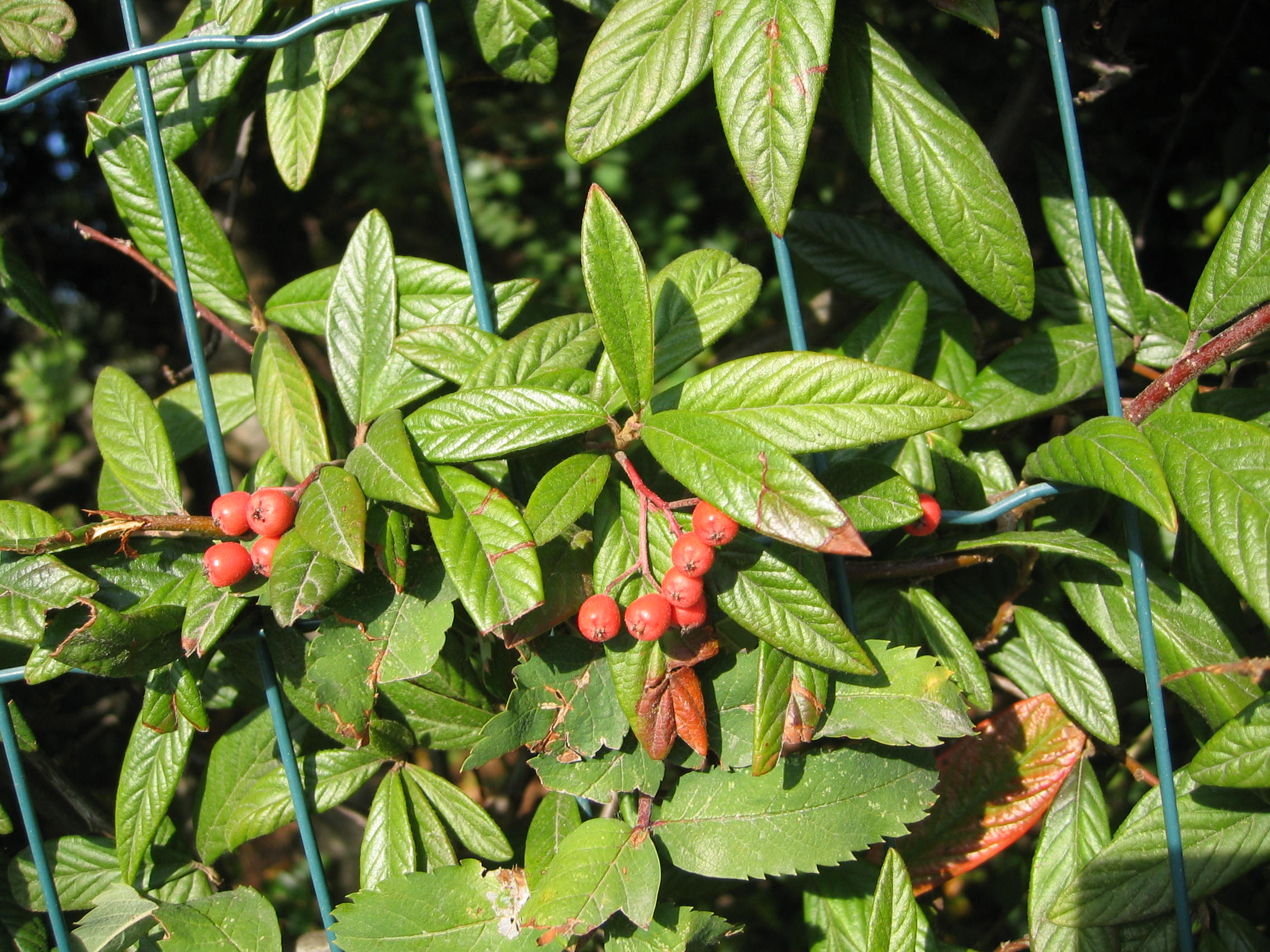 Ruhland, Karl-Marx-Straße 6, Weidenblättrige Zwergmispel (Cotoneaster salicifolius) am Zaun, Frucht tragend, Herbst